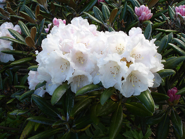 Rhododendron degronianum subsp. yakushimanum var. yakushimanum